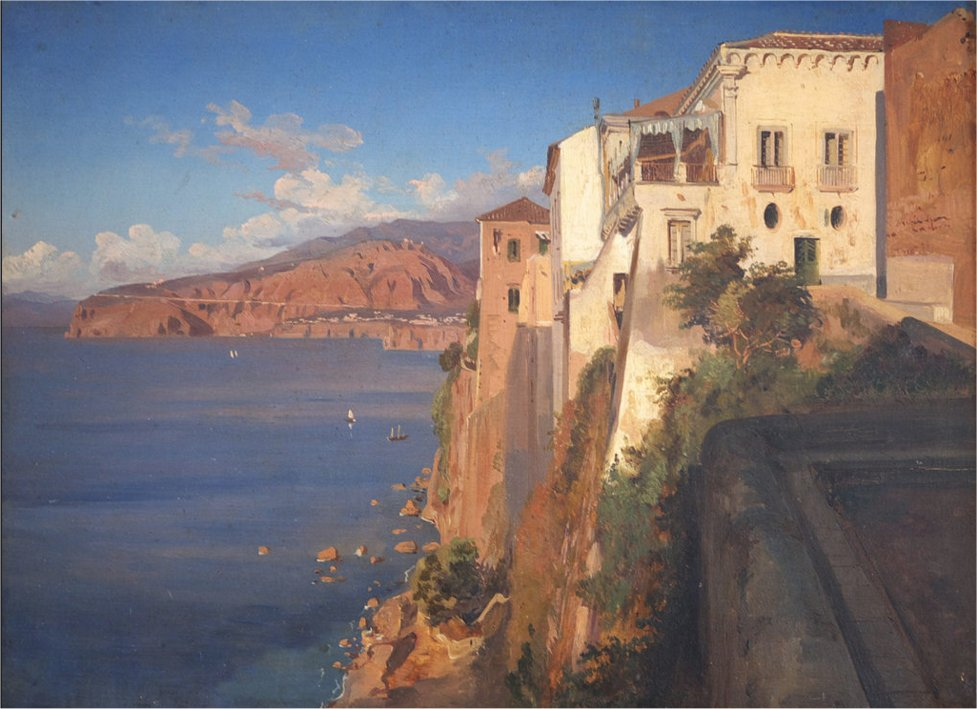 Panorama di Sorrento con casa del Tasso di Teodoro Duclère